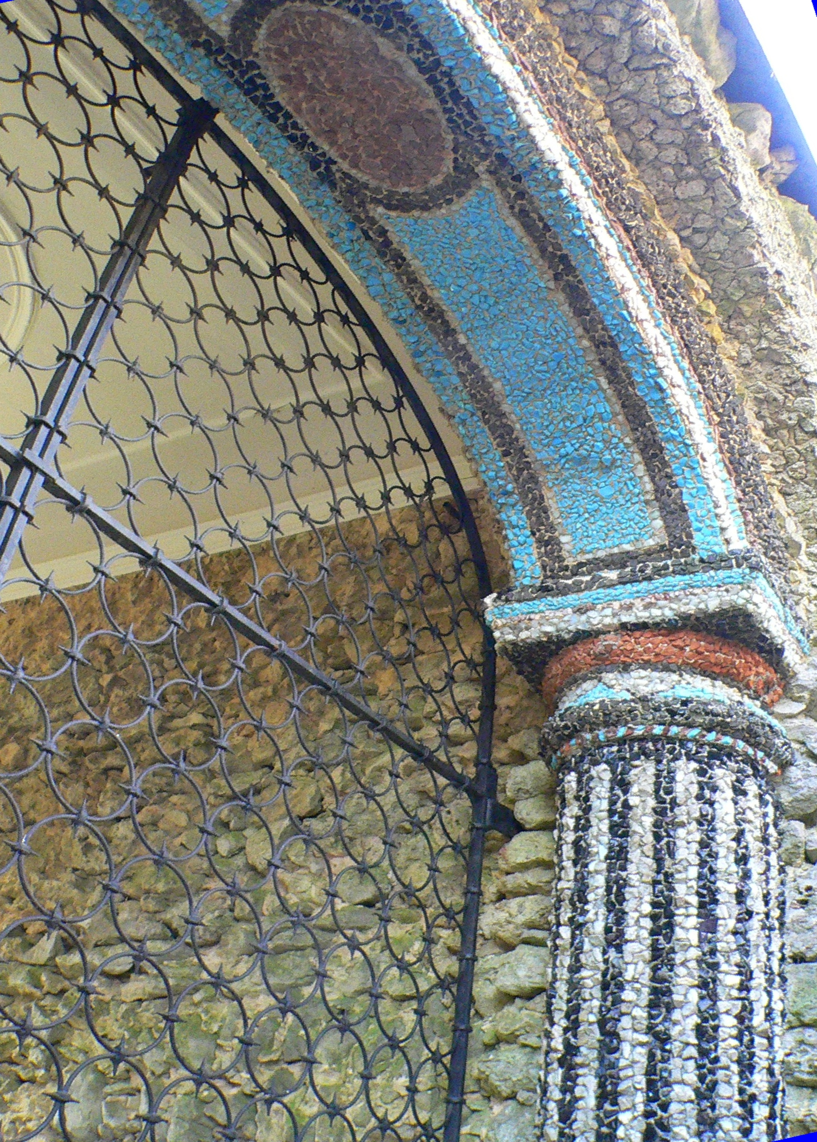 Felsengarten Sanspareil, Detail Innenhof Morgenländischer Bau - Fränkische Schweiz, Bayern